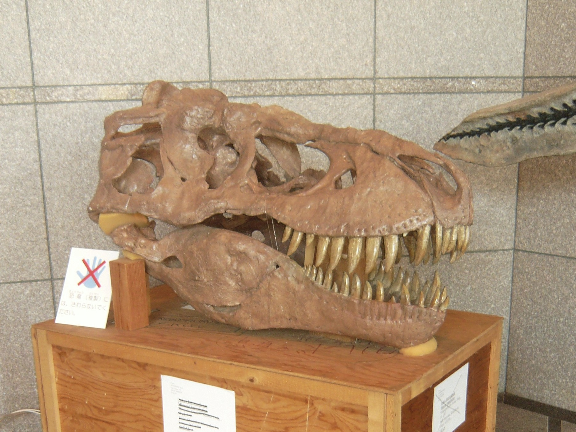 Gifu Prefectural Museum 岐阜県博物館のエントランスホールに展示してあるw:ja:タルボサウルスの骨格標本（岐阜県博物館）,Seki,Gifu,Japan（岐阜県関市）で撮影。